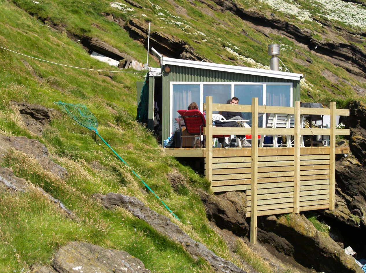 kofinn í Hellisey